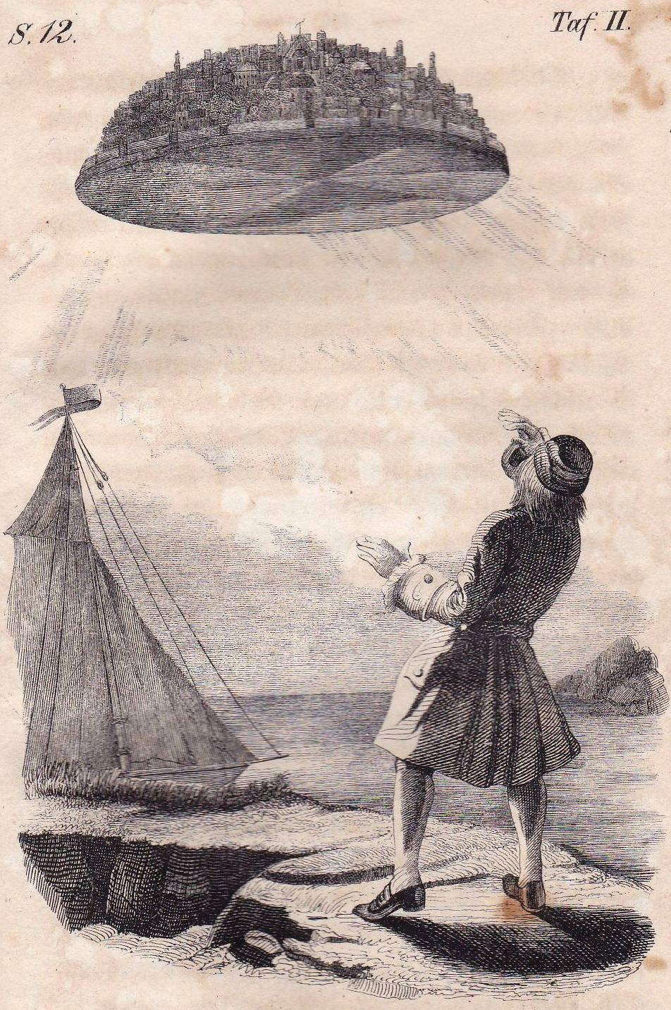 Jonathan Swift: Gullivers Reisen (Ausgabe von 1839), die fliegende Insel Laputa.